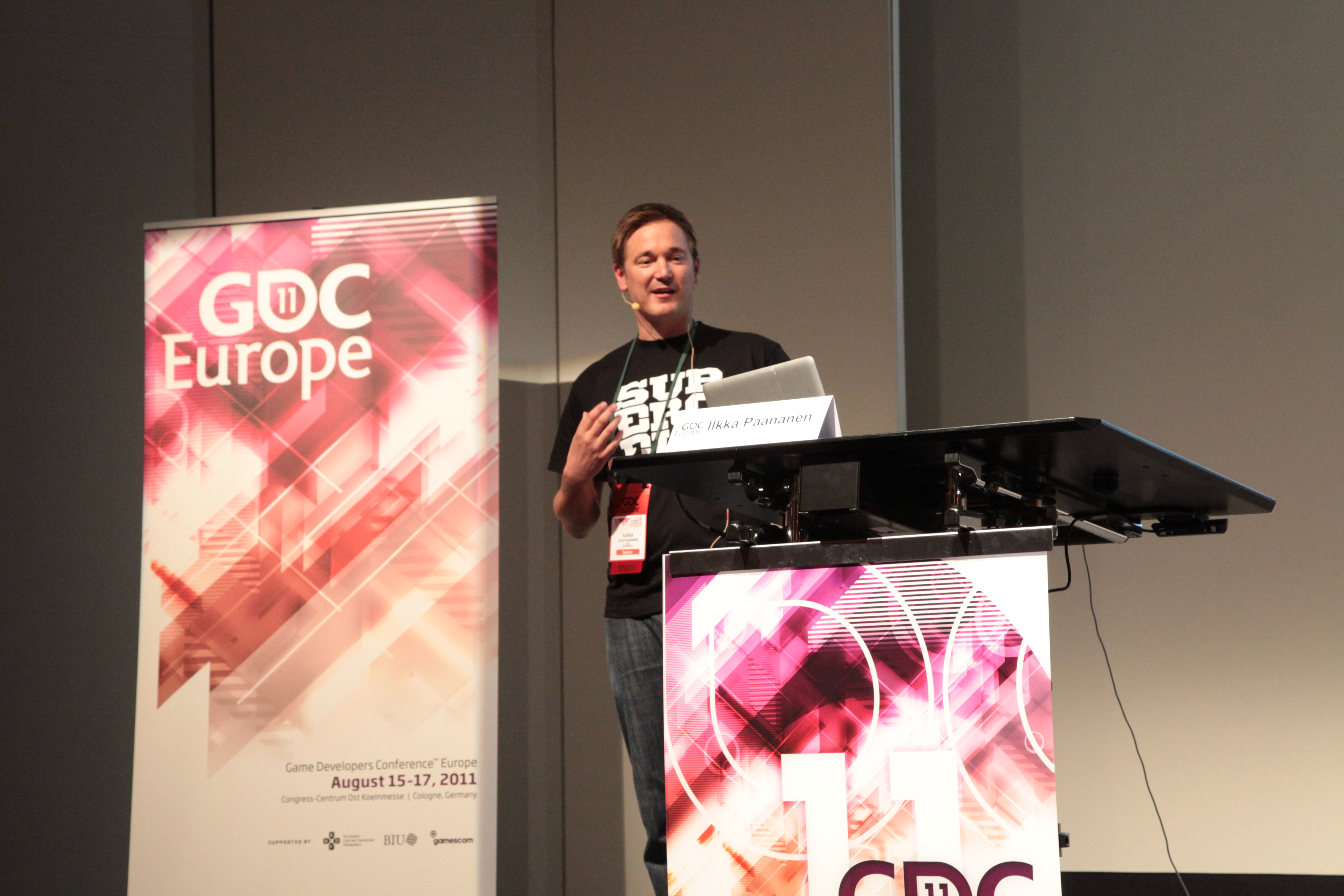 GDCE 11 Monday Session Ilkka Paananen, Supercell